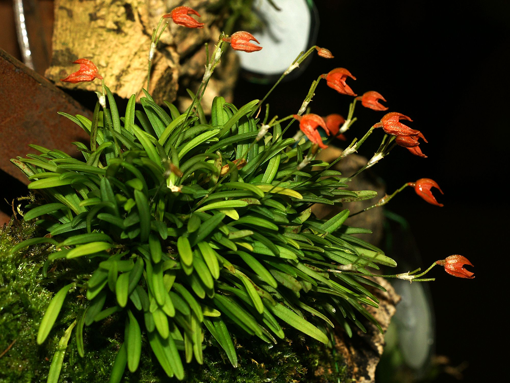 Specklinia glandulosa